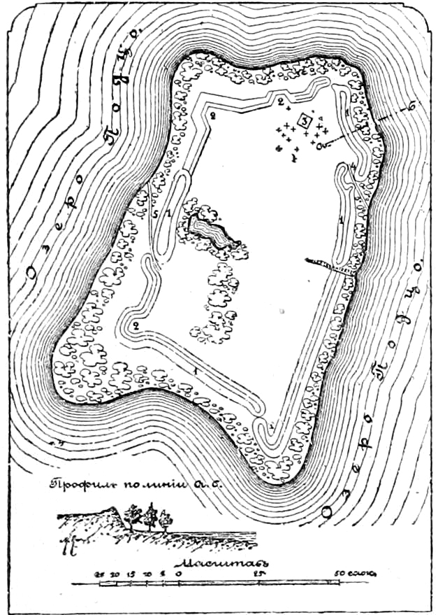 Схема бывшей крепости Заволочье. Это изображение было использовано для иллюстрирования статьи «Заволочье» опубликованной в десятом томе «Военной энциклопедии», который был издан книгоиздательским товариществом И. Д. Сытина в 1912—1913 гг. в столице Российской империи городе Санкт-Петербурге. Пояснение плана: 1. Земляной вал; 2. Очертания полуутратившихся бастионов; 3. Место бывшей церкви и кладбища; 4 и 5. Два въезда в укрепление с берега.